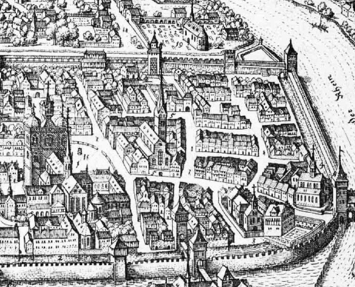 Merian, Konstanz 1643, Detail